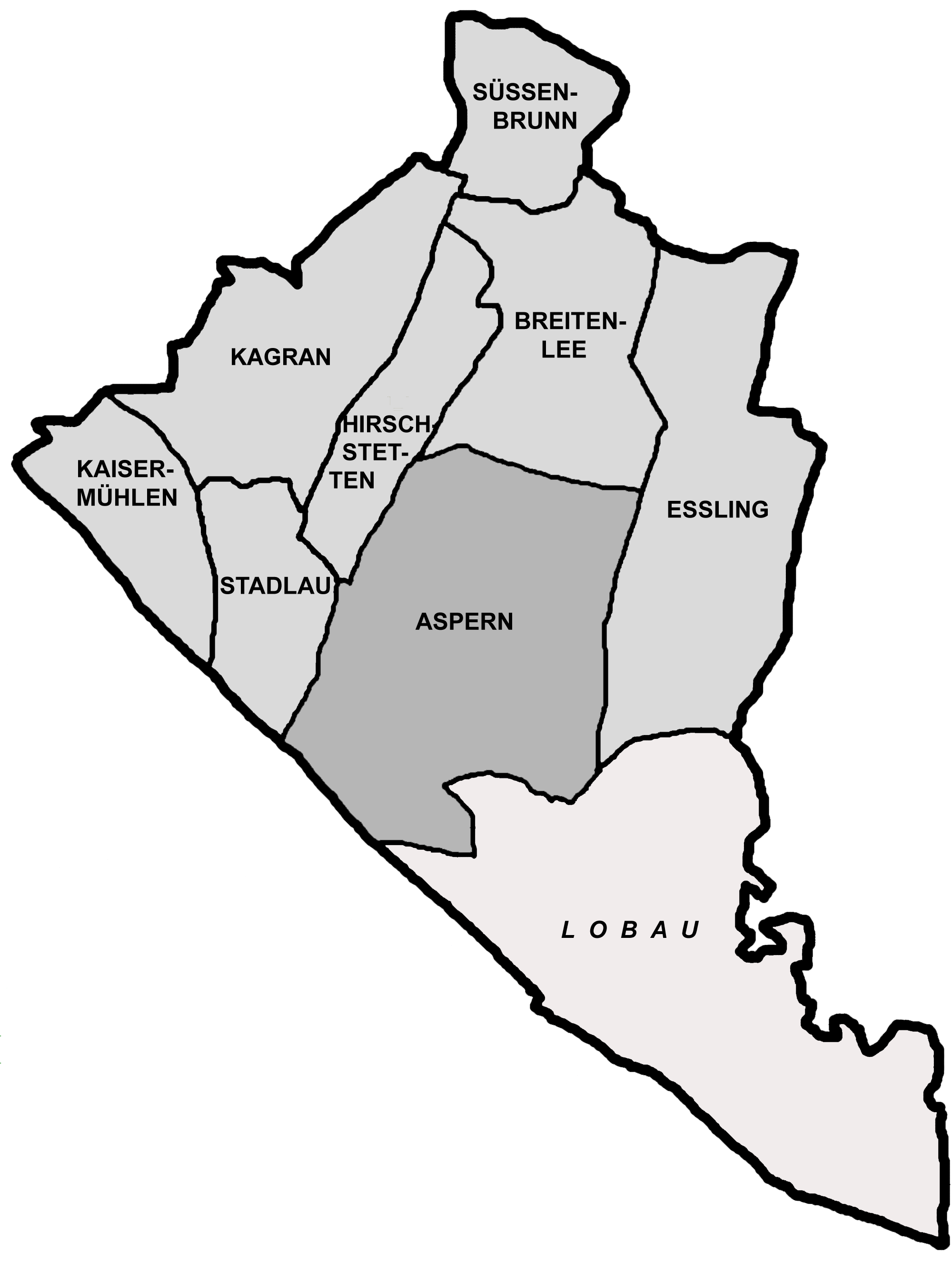 Positionskarte des Donaustädter Bezirksteils Aspern in Wien